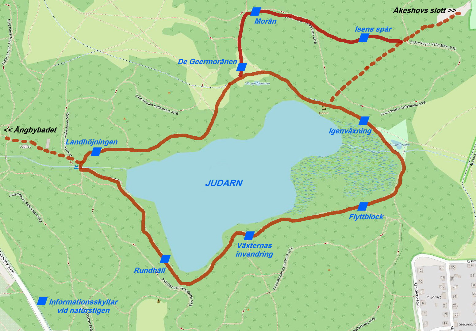 Judarskogens naturstig karta Bakgrundskarta: Open Sreet Map Förklaringar: Holger Ellgaard